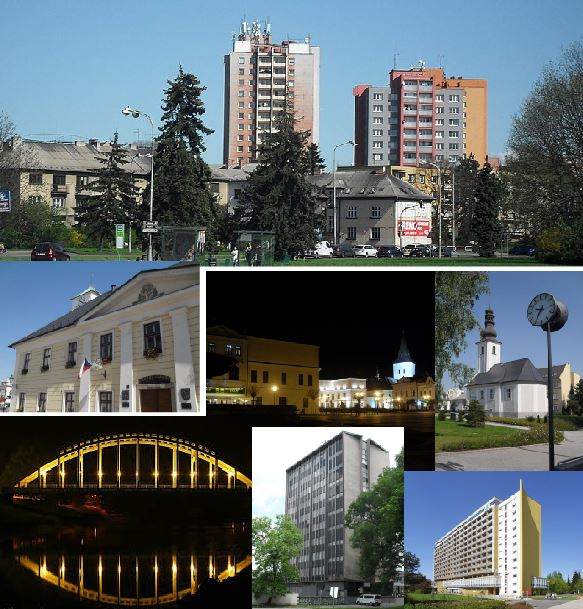 Karviná, Fryštát